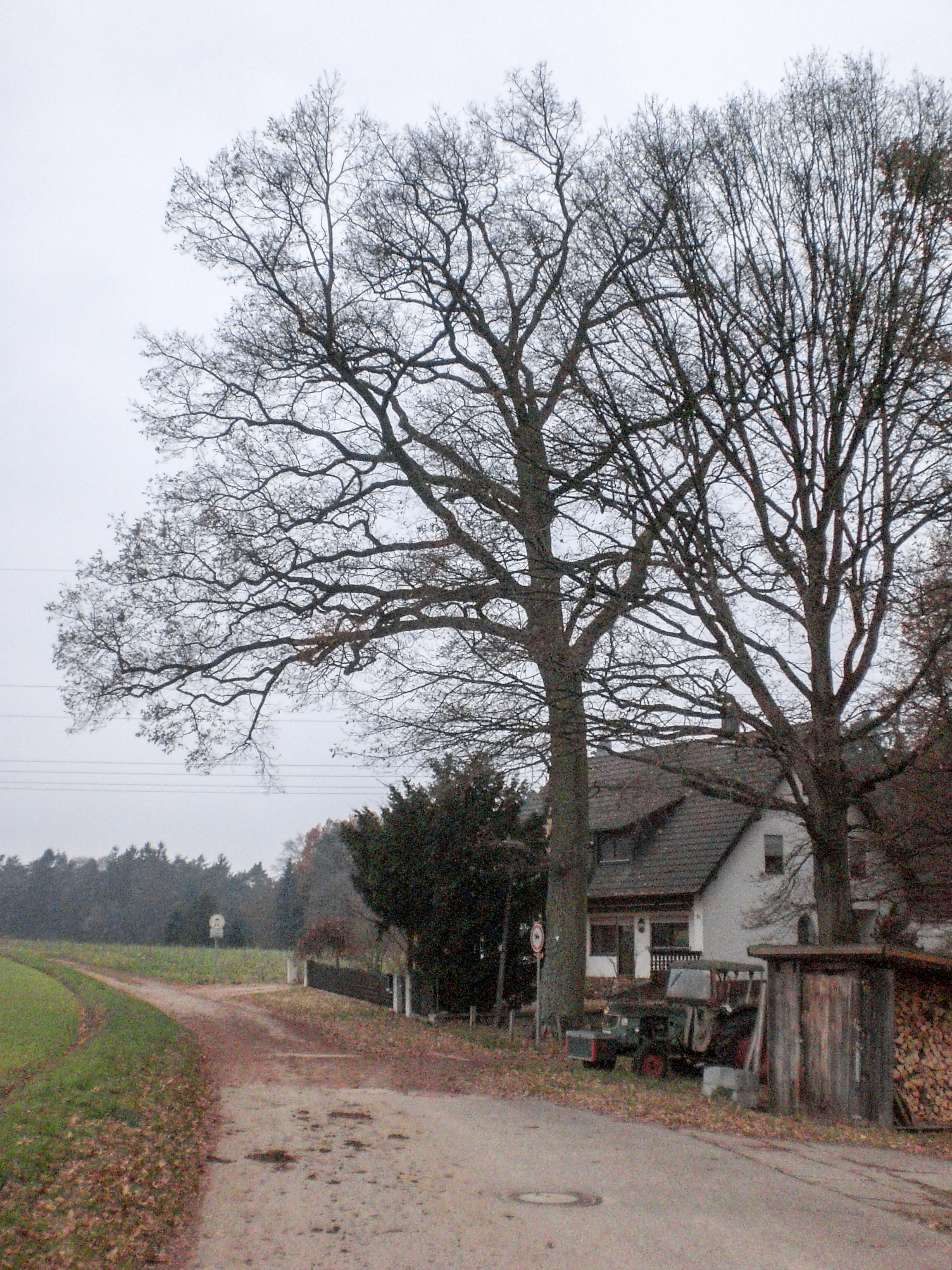 Naturdenkmal, Eiche am Vogelherd, Altenthann, Schwarzenbruck